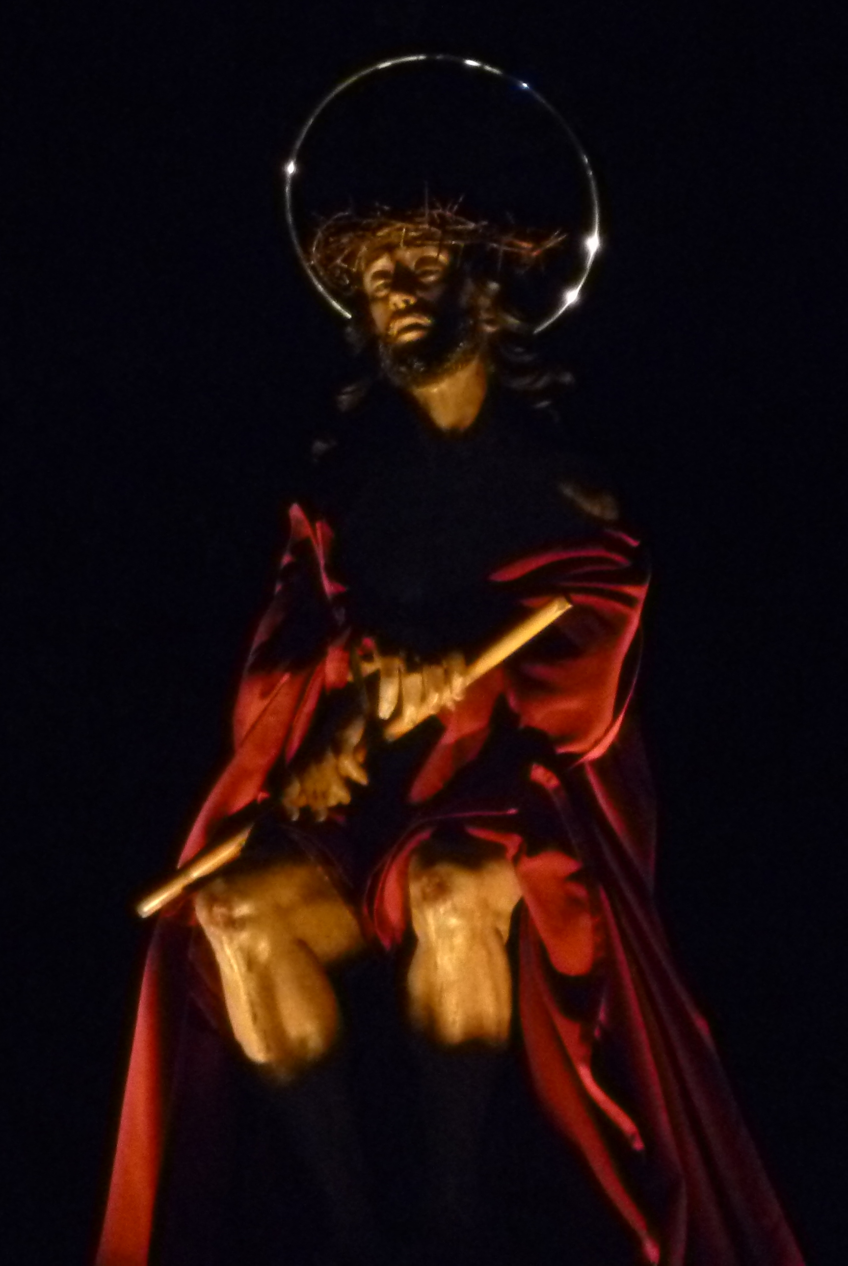 Processione dei Misteri, Ruvo di Puglia